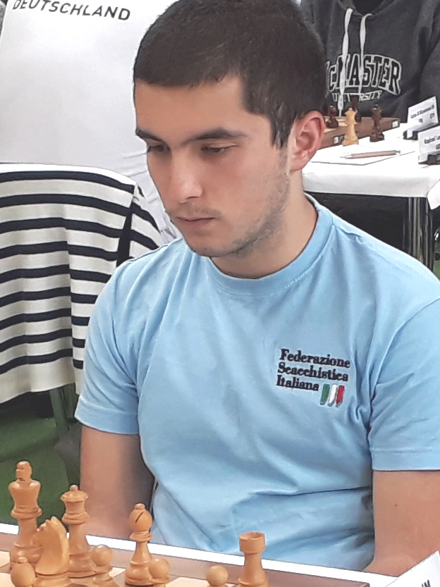 Francesco Sonis, Runde 4 Mitropa Cup 2019 in Radenci.